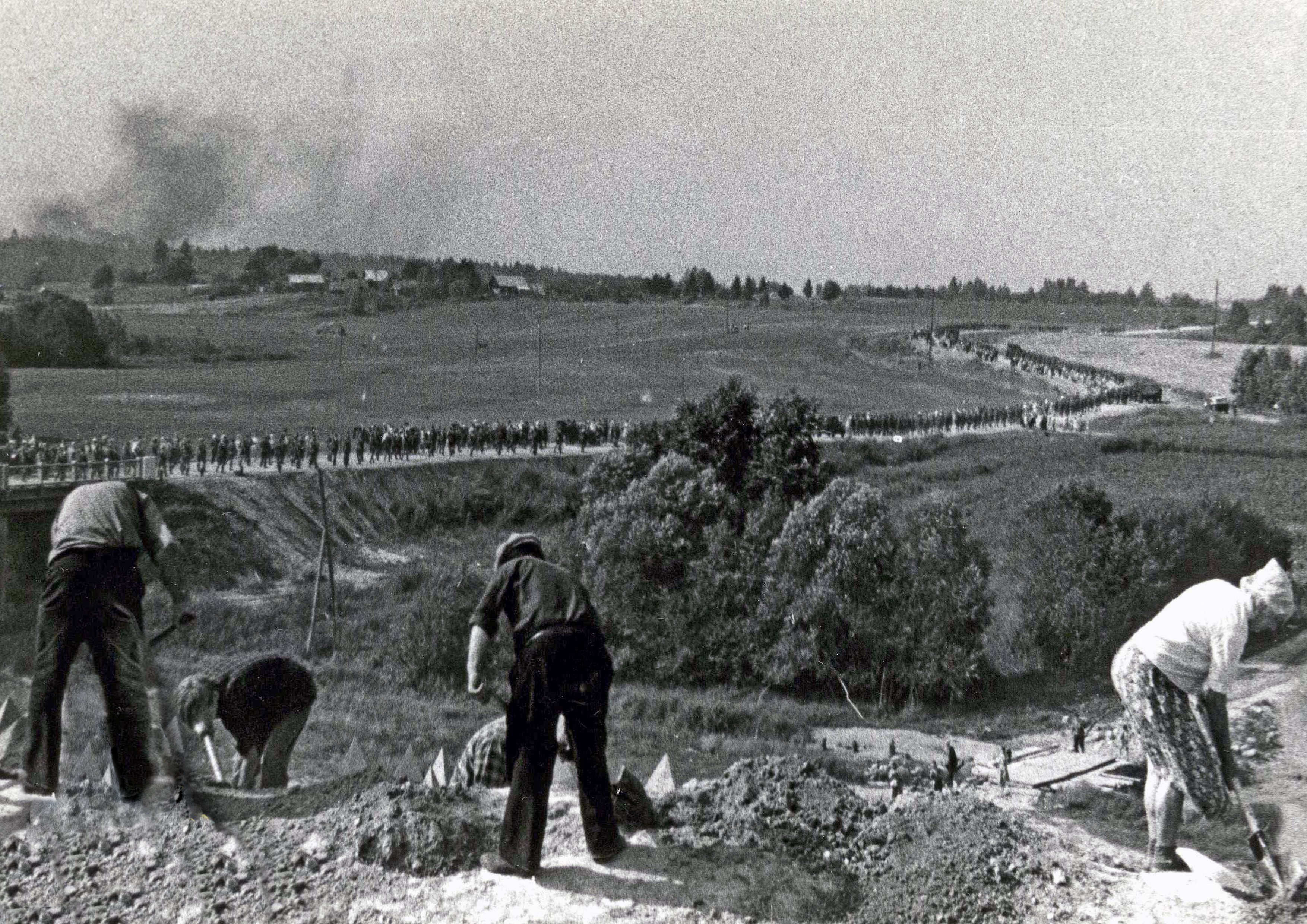 Гражданское население на строительстве укреплений Лужского оборонительного рубежа летом 1941 года.